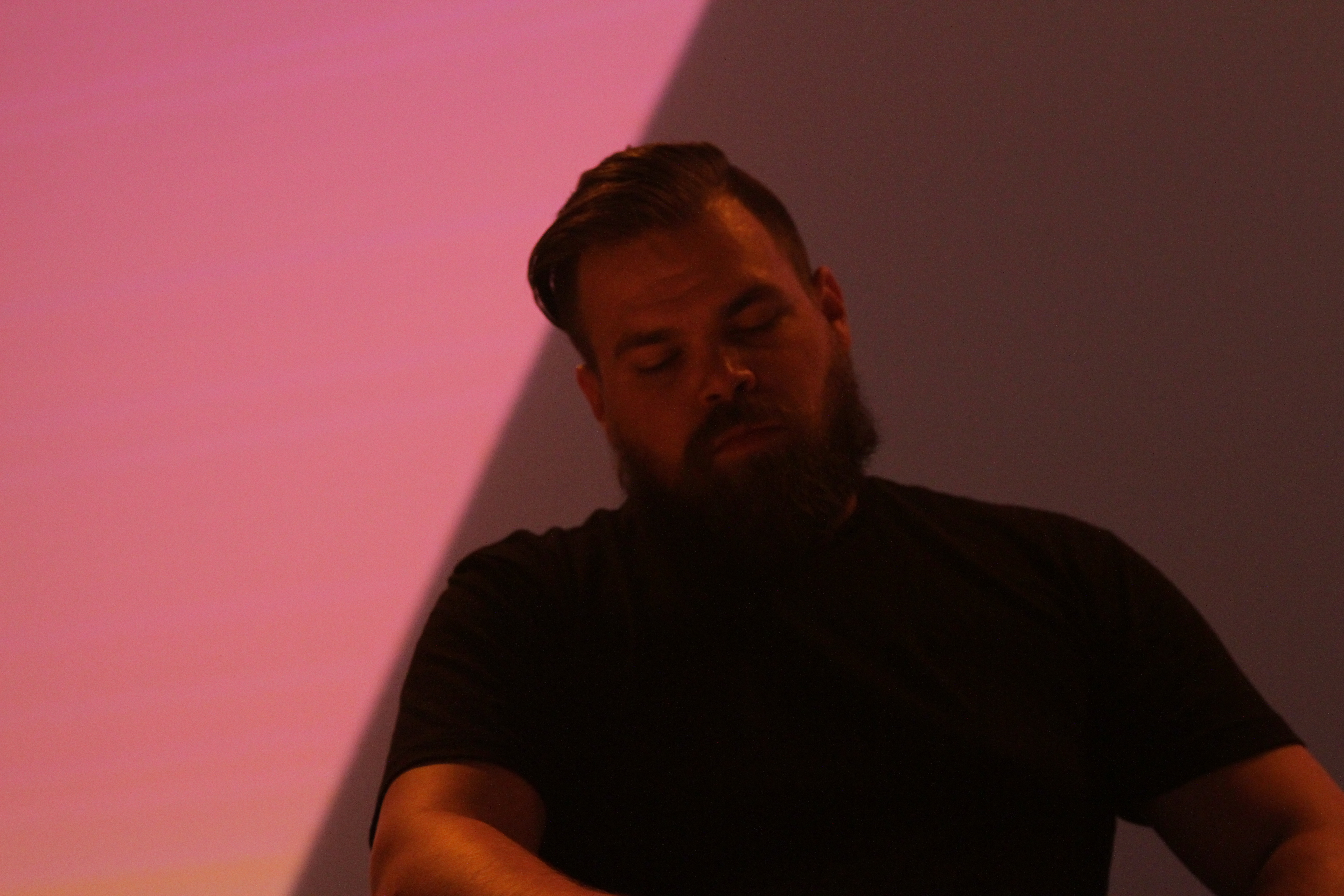 Com Truise auf dem Way Back When Festival in Dortmund